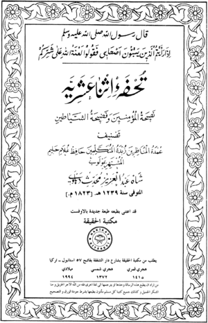 مصنف: شاہ عبد العزیز محدث دہلوی